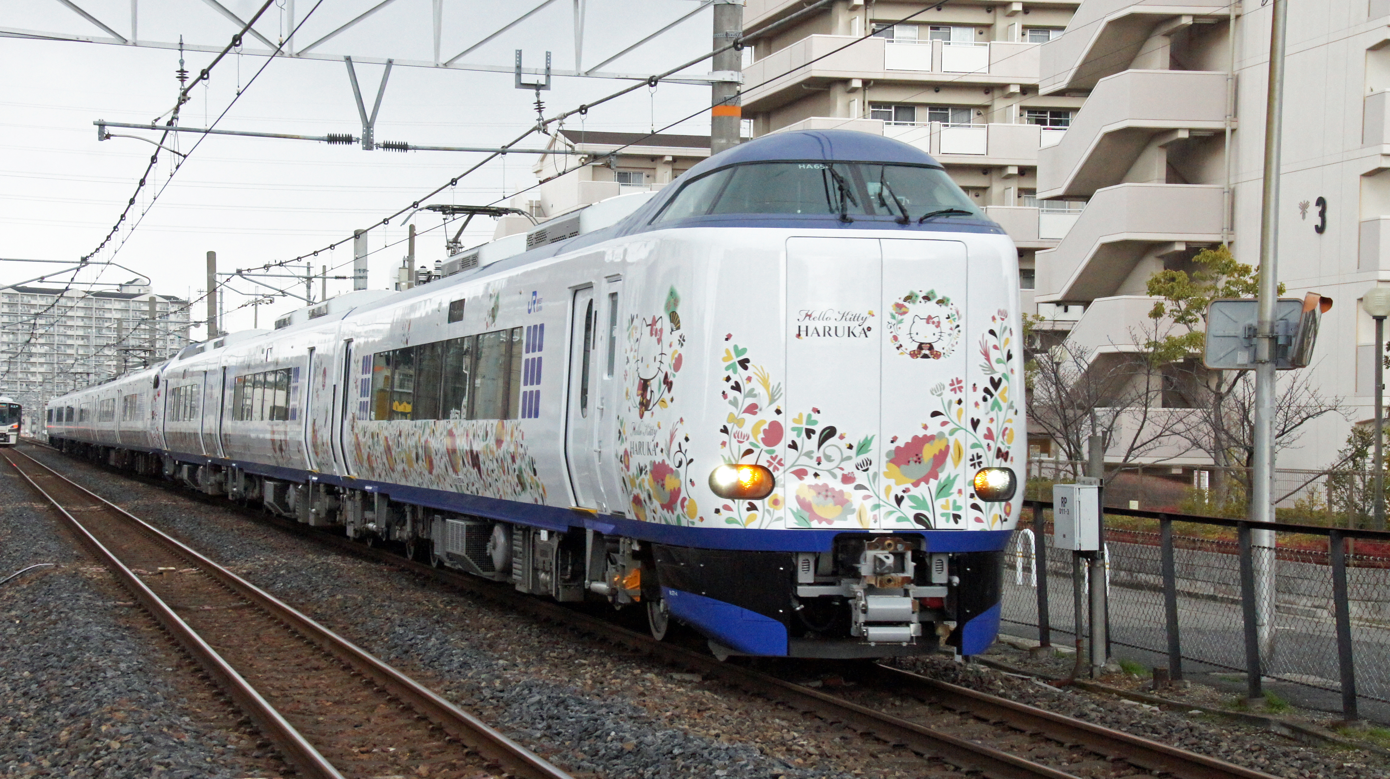 271系による関空特急「はるか」関西空港行き